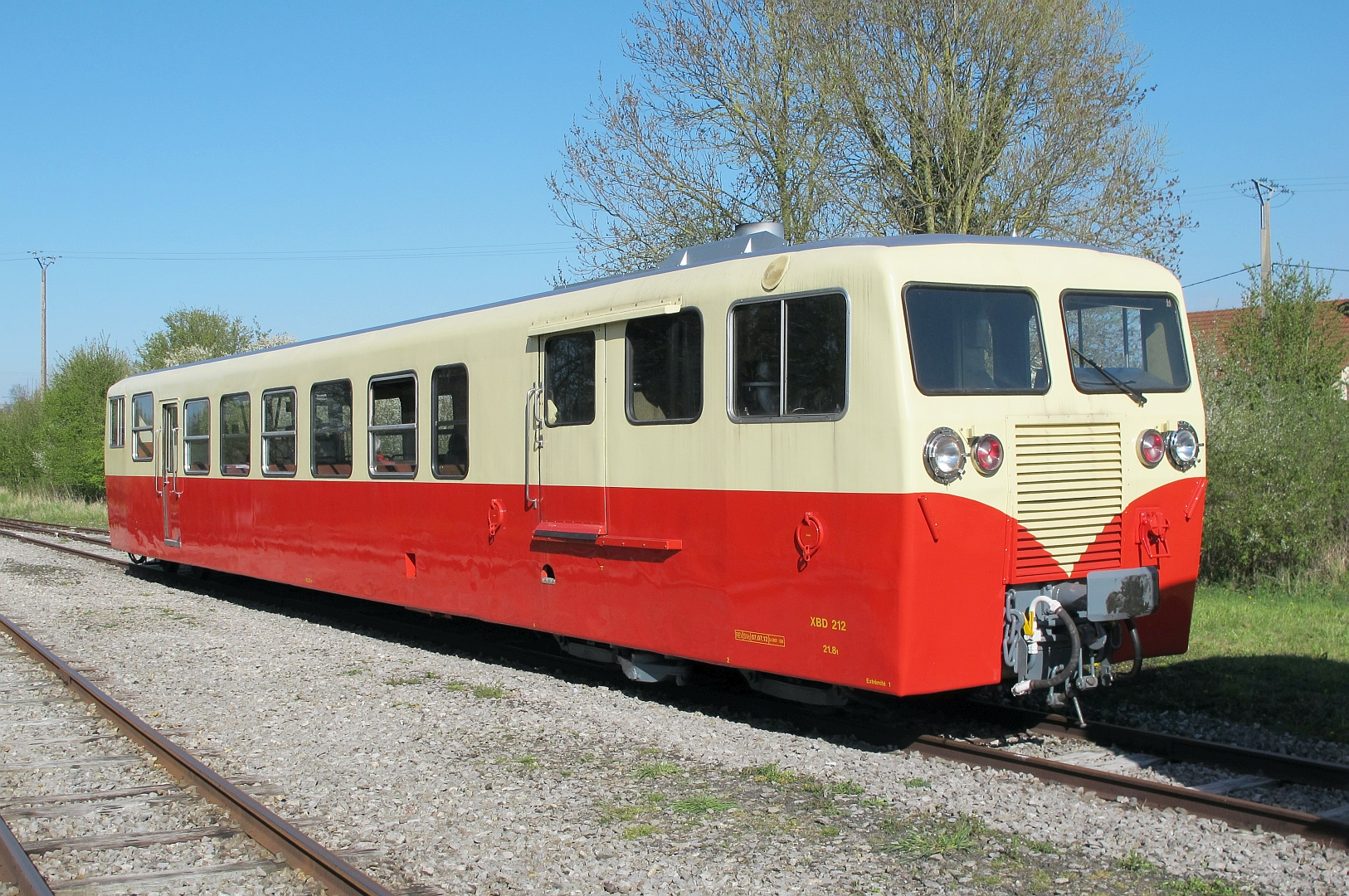 L'autorail Verney X212, sur le chemin de fer de la baie de Somme le 28 avril 2013.